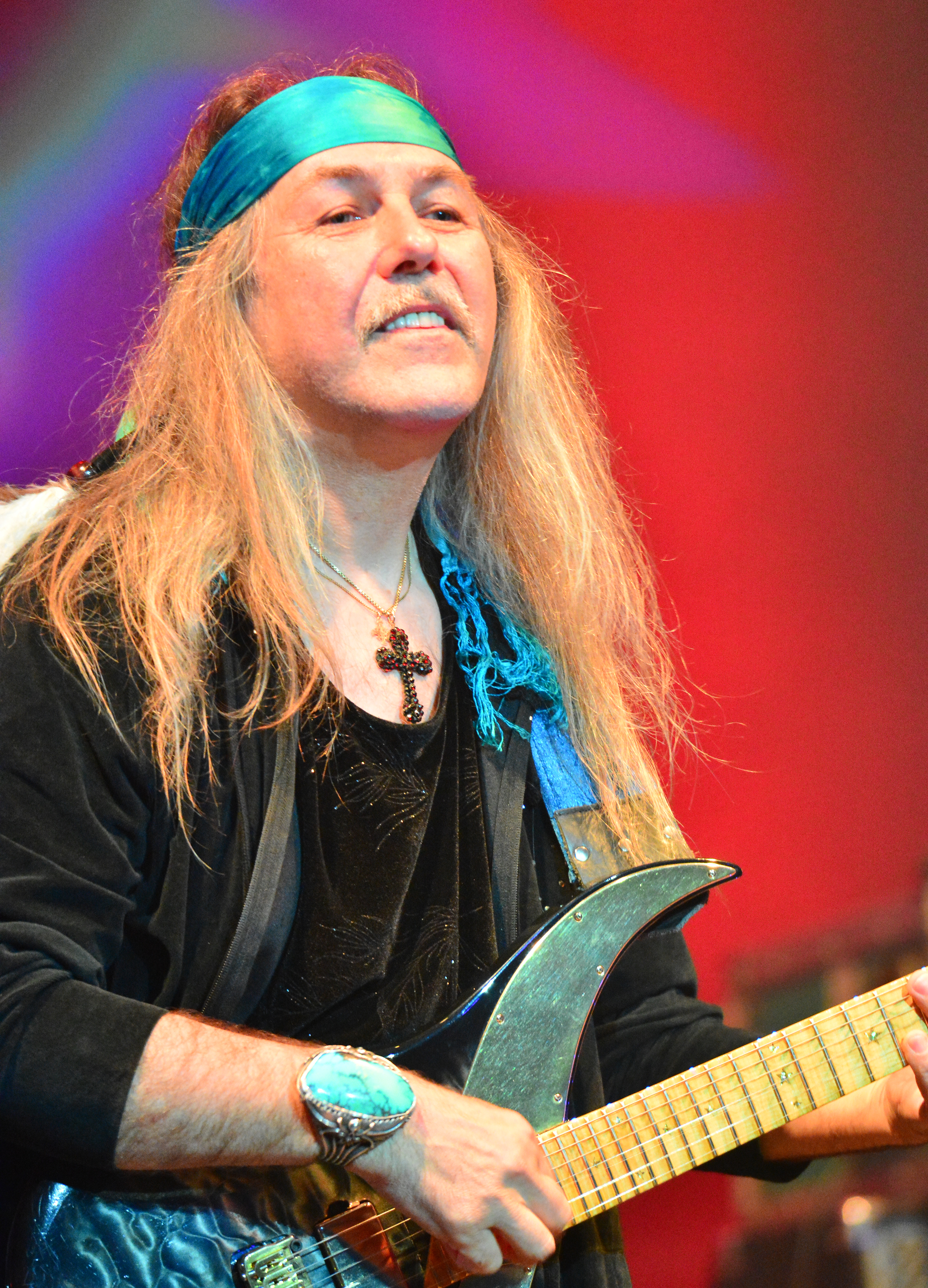 Uli Jon Roth beim Wacken Open Air 2015